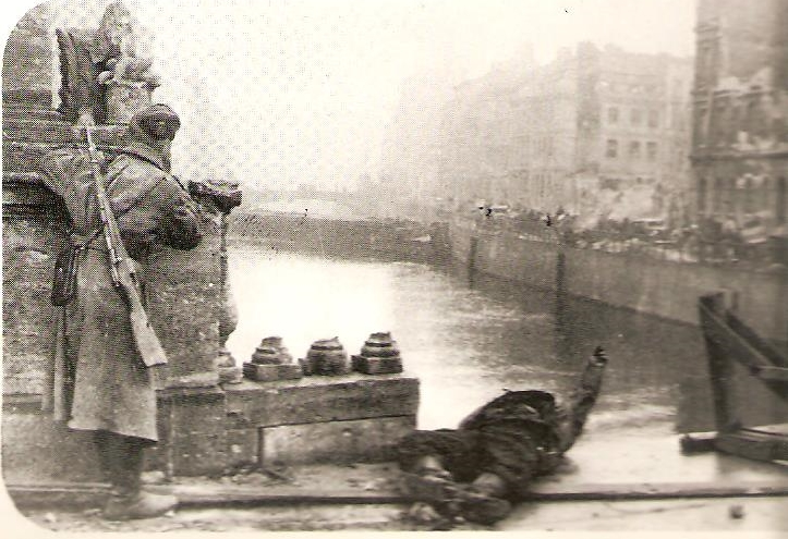 Soldato sovietico osserva il fiume Sprea al centro di Berlino, durante la battaglia finale